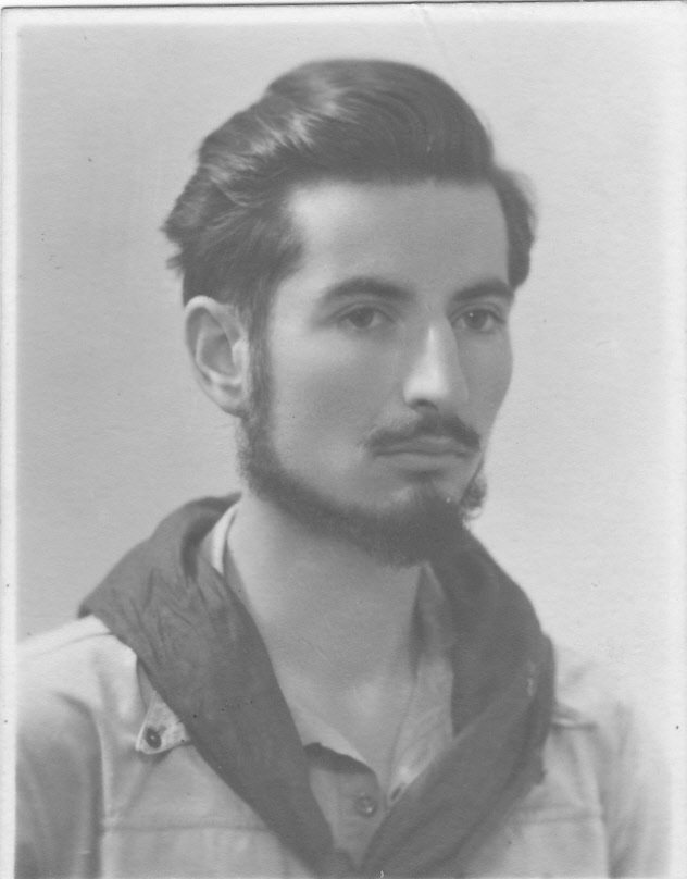 Michel "Gaetan" DuBot partigiano nel 1945